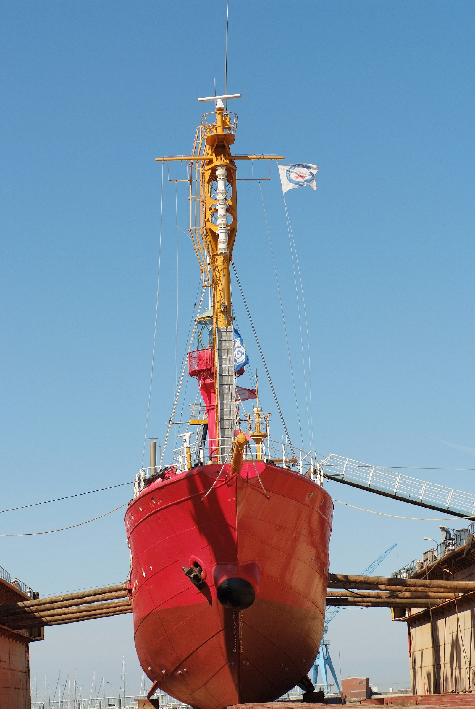 Feuerschiff Bürgermeister O’Swald II im Hafen von Cuxhaven